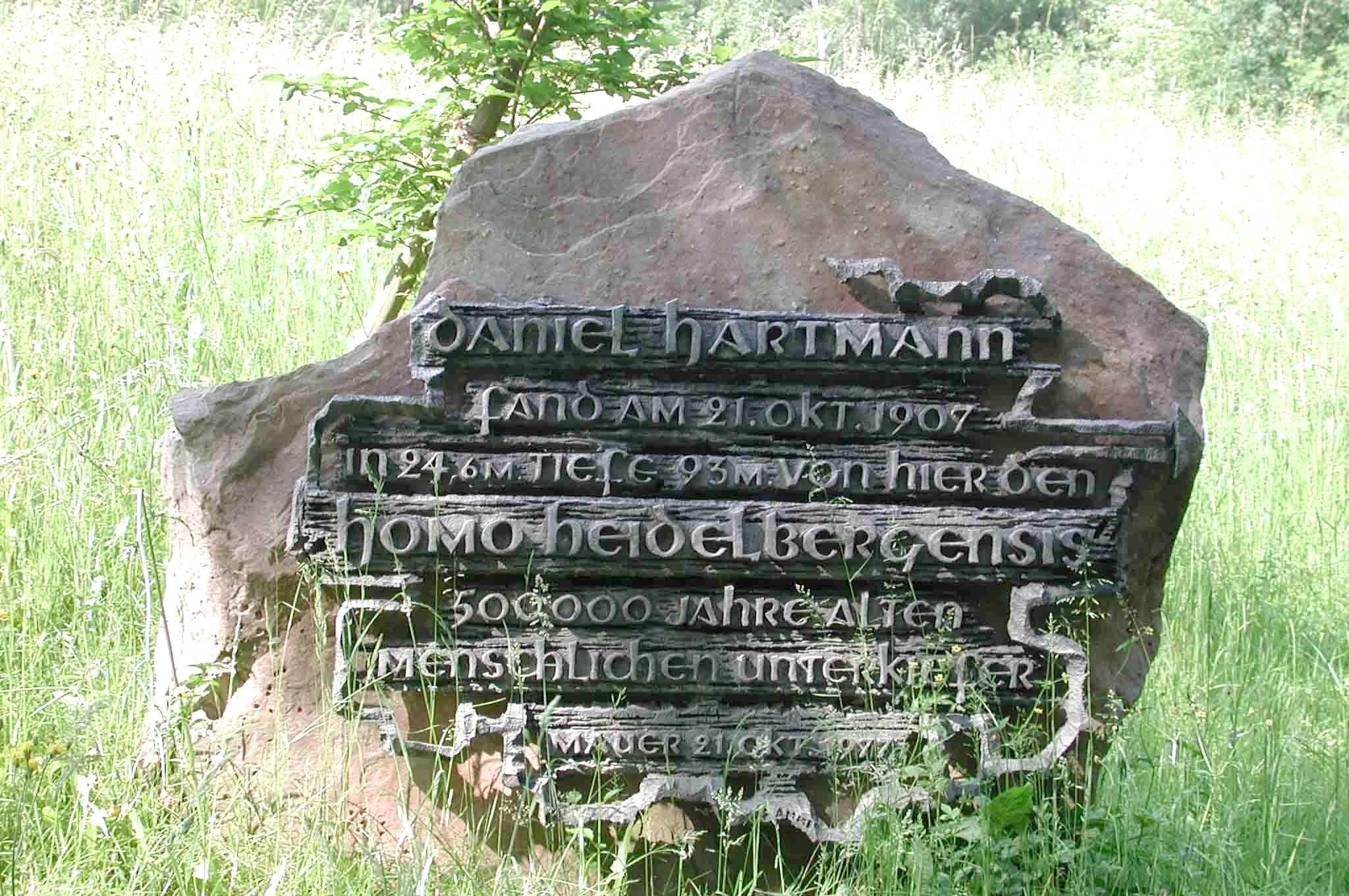 Gedenkstein zur 70sten Fundwiederkehr des Homo heidelbergensis auf der Gemarkung der Gde. Mauer bei Heidelberg (Rhein-Neckar-Kreis).